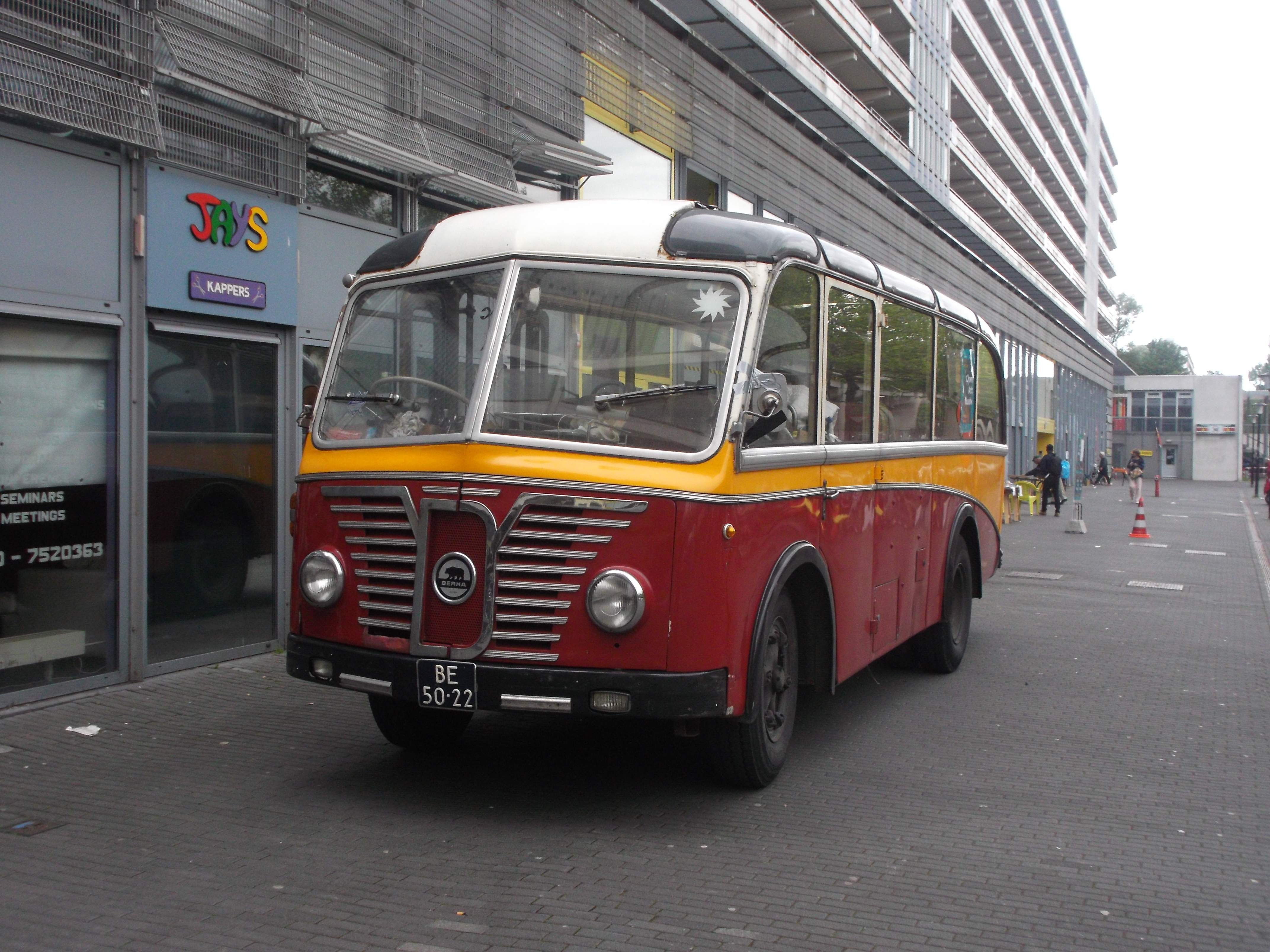 Berna bus, zeer oud model. Werd op 20 juni 2015 gebruikt voor een rondleiding langs 'kunst' in de Bijlmermeer, Amsterdam-Zuidoost.